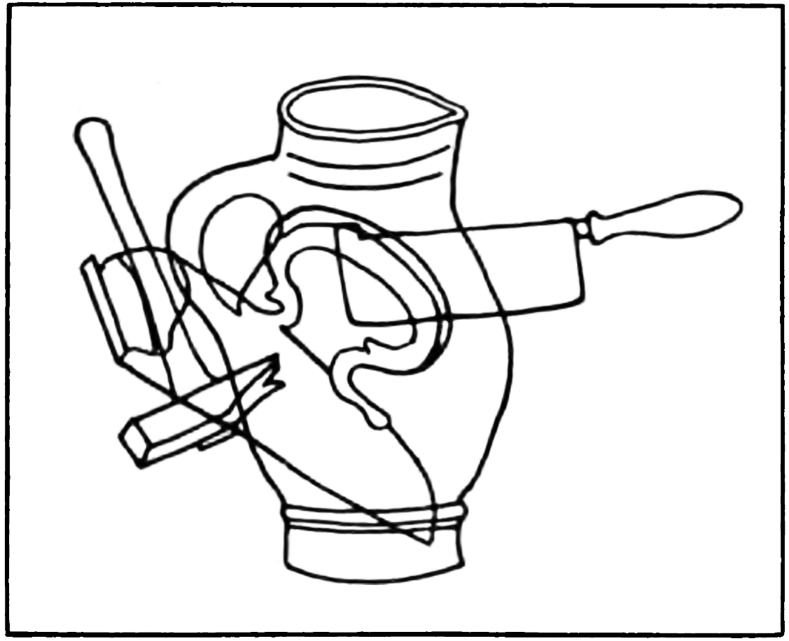 Poppelreuter' probe